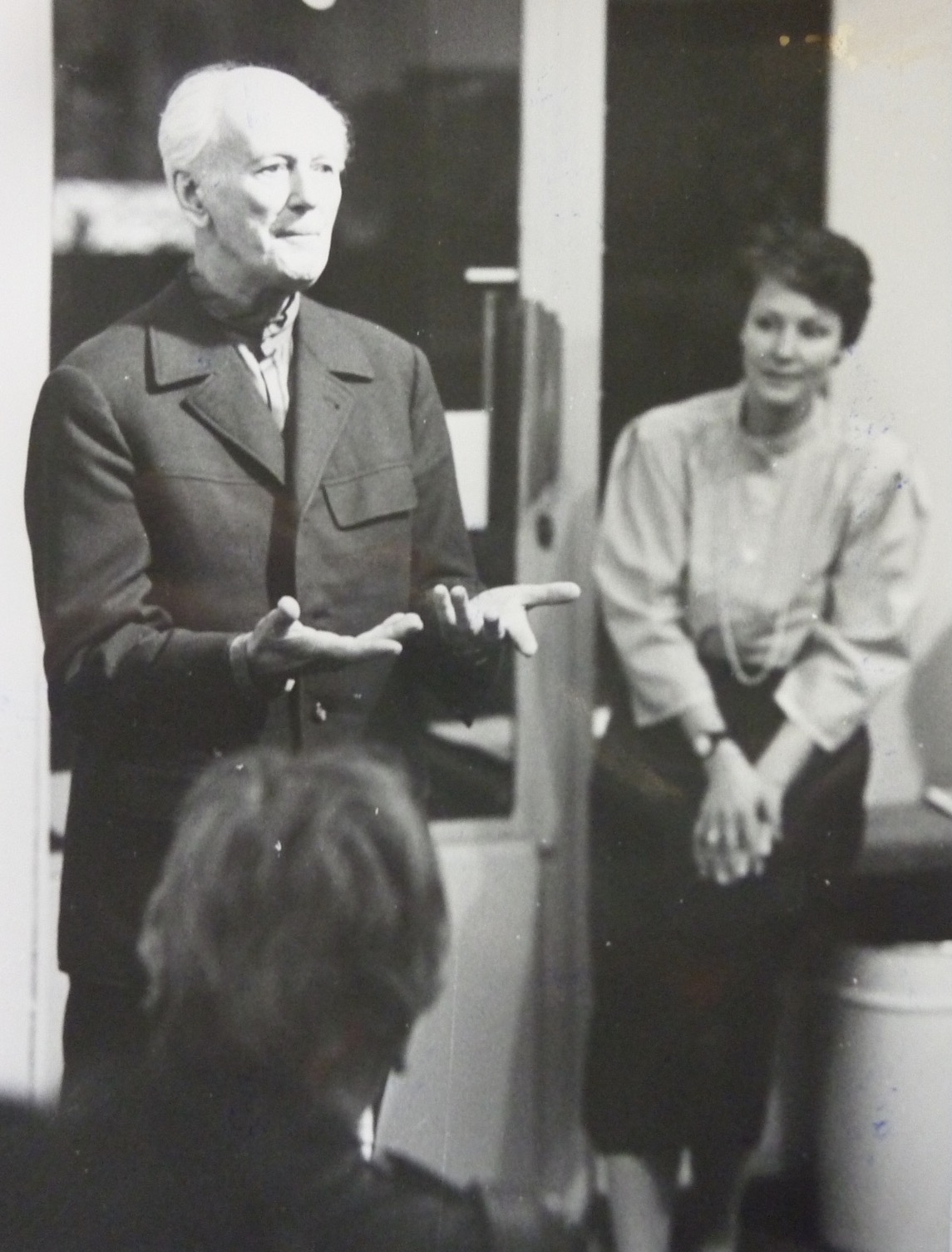 Vernissage zur Ausstellung anl. 75. Geburtstag Fritz Fröhlich, 1985